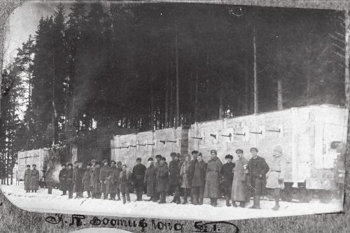 Eesti armee 6. jalaväepolgu 12. roodu võitlejad Pärnu Ühistöö kulul ja esimehe Järatsi juhtimisel piimarongist ümberehitatud soomusrongi nr. 1 juures Voltveti metsa vahel Vabadussõja ajal enne pealetungi Mõisakülale, võitlejaid juhib leitnant Kivi.